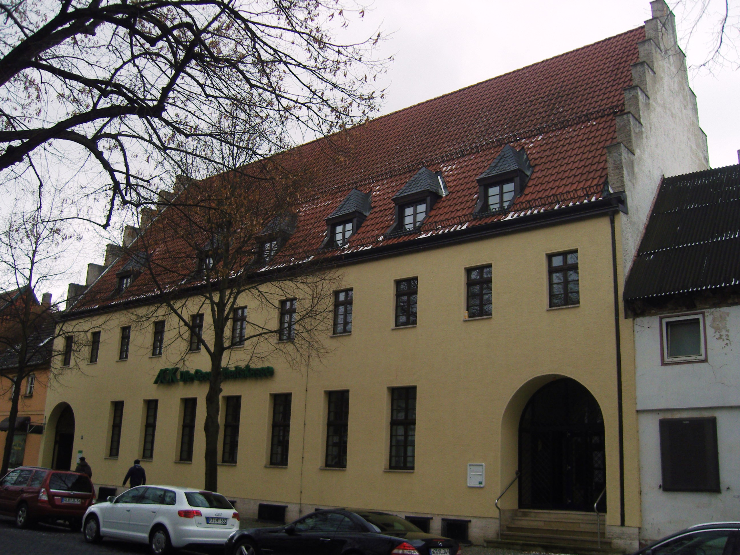 Denkmalgeschütztes Bürogebäude in der Weberstraße 15-17 in Quedlinburg; Heute AOK